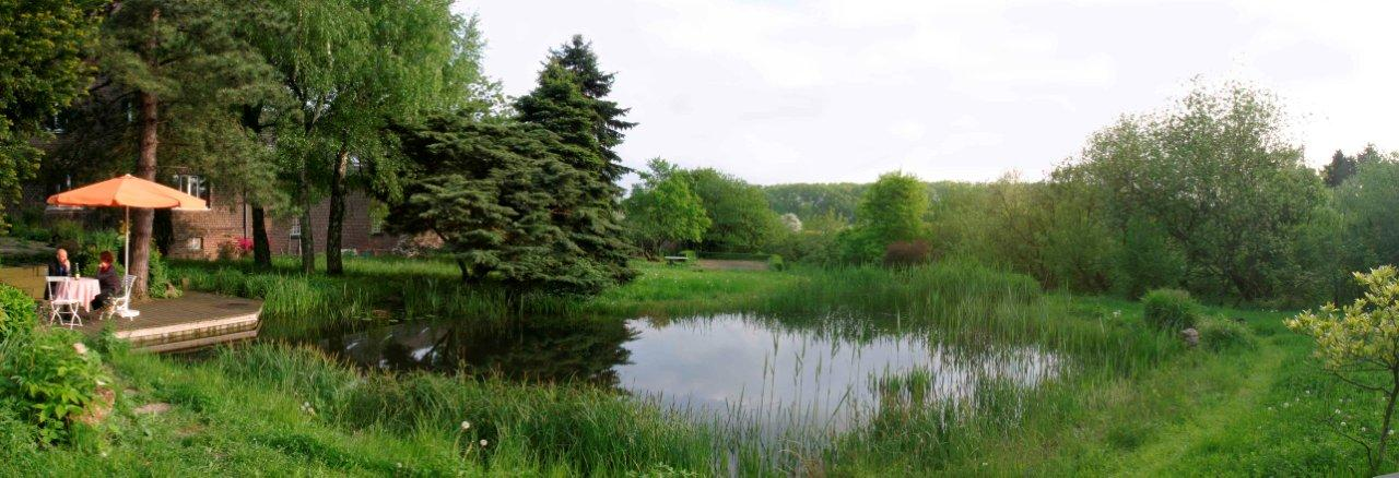 Naturalistycznie uksztaltowany staw ekstensywny, bez rozdzielenia pomiedzy strefami regeneracyjnymi i strefa kapielowa